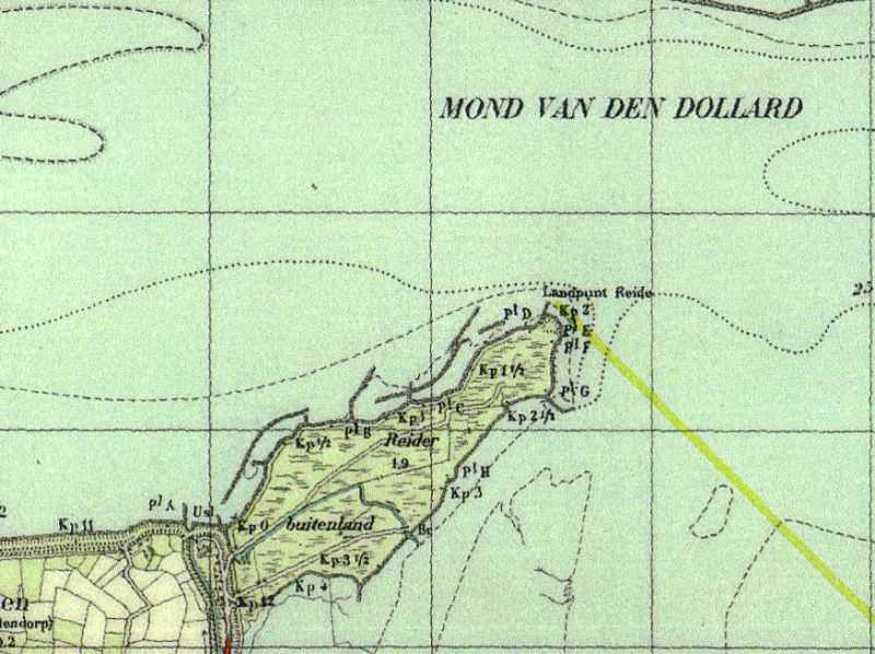 Punt van Reide van topografische kaart uit 1933, Publiek domein vanwege ouderdom